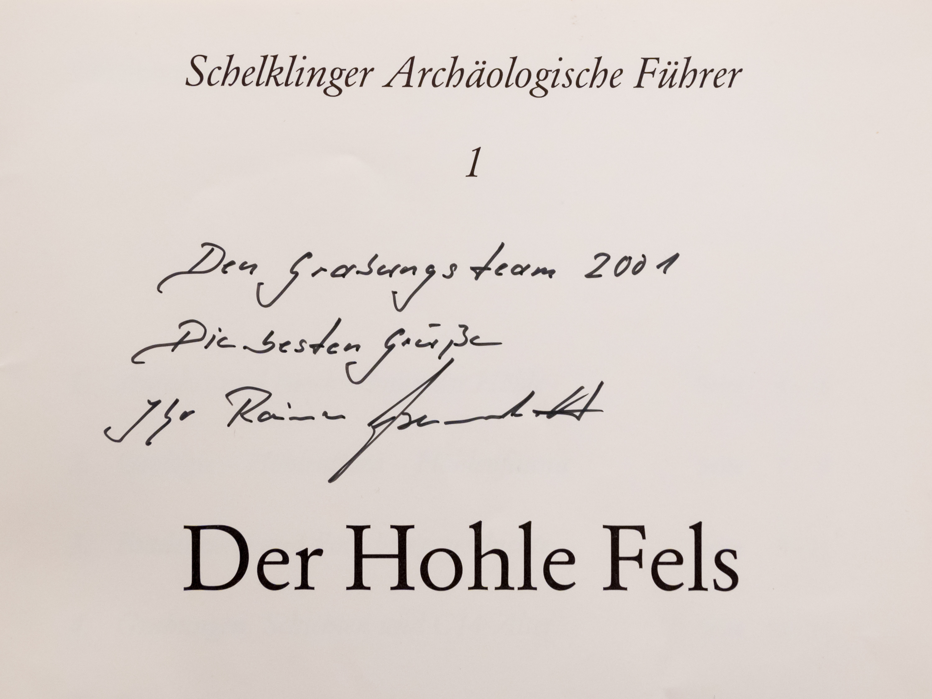 Widmung Reiner Blumentritts in seiner Publikation "Der Hohle Fels" (Den [sic] Grabungsteam 2001 Die besten Grüße Ihr Reiner Blumentritt).